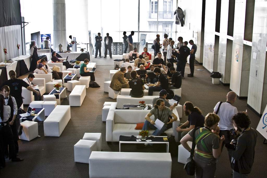 Hall